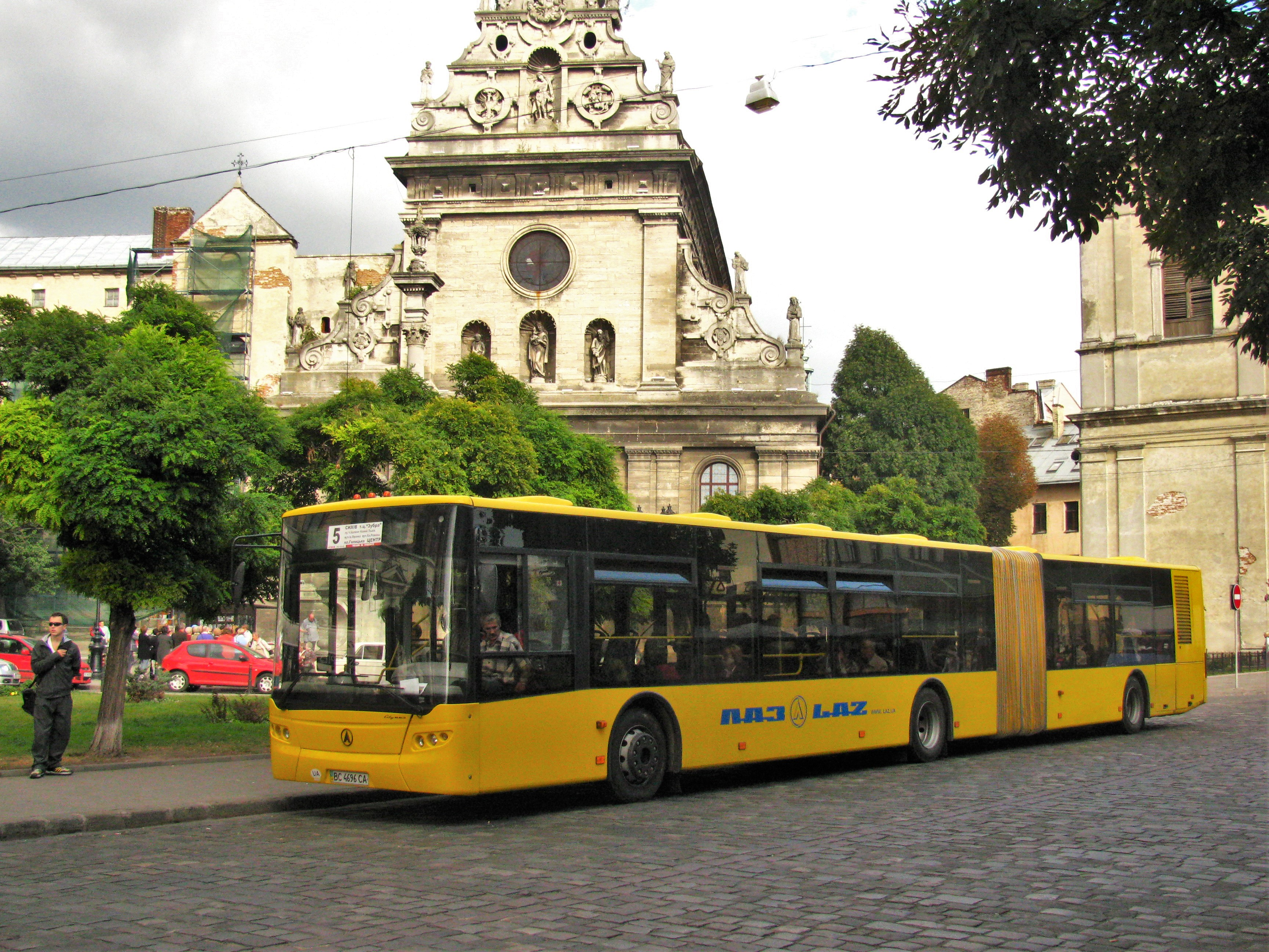 CityLAZ-20LF на маршруті № 5 на площі Галицькій у Львові.